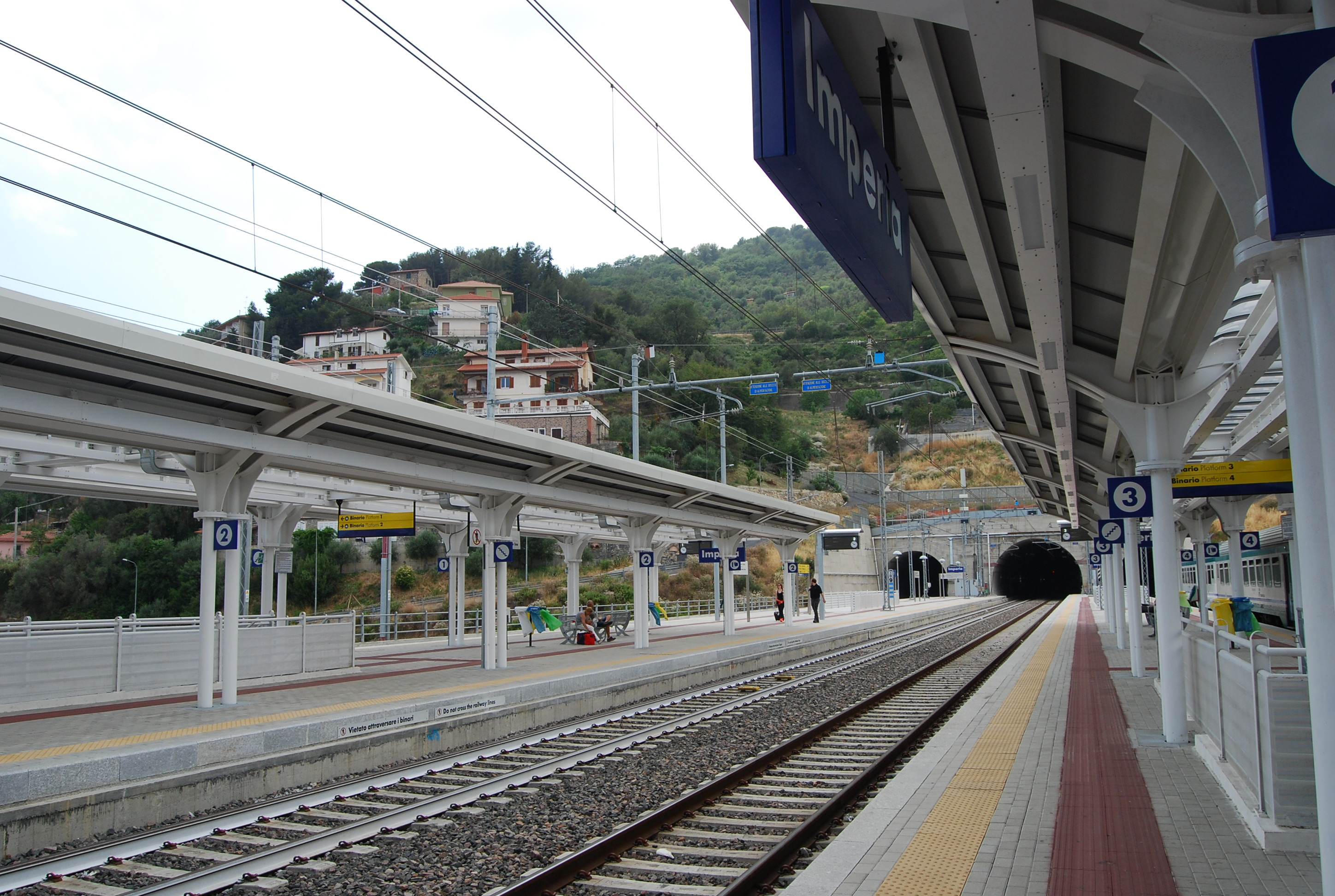 I binari 1, 2 e 3 (il quarto è fuori inquadratura) della Stazione di Imperia.